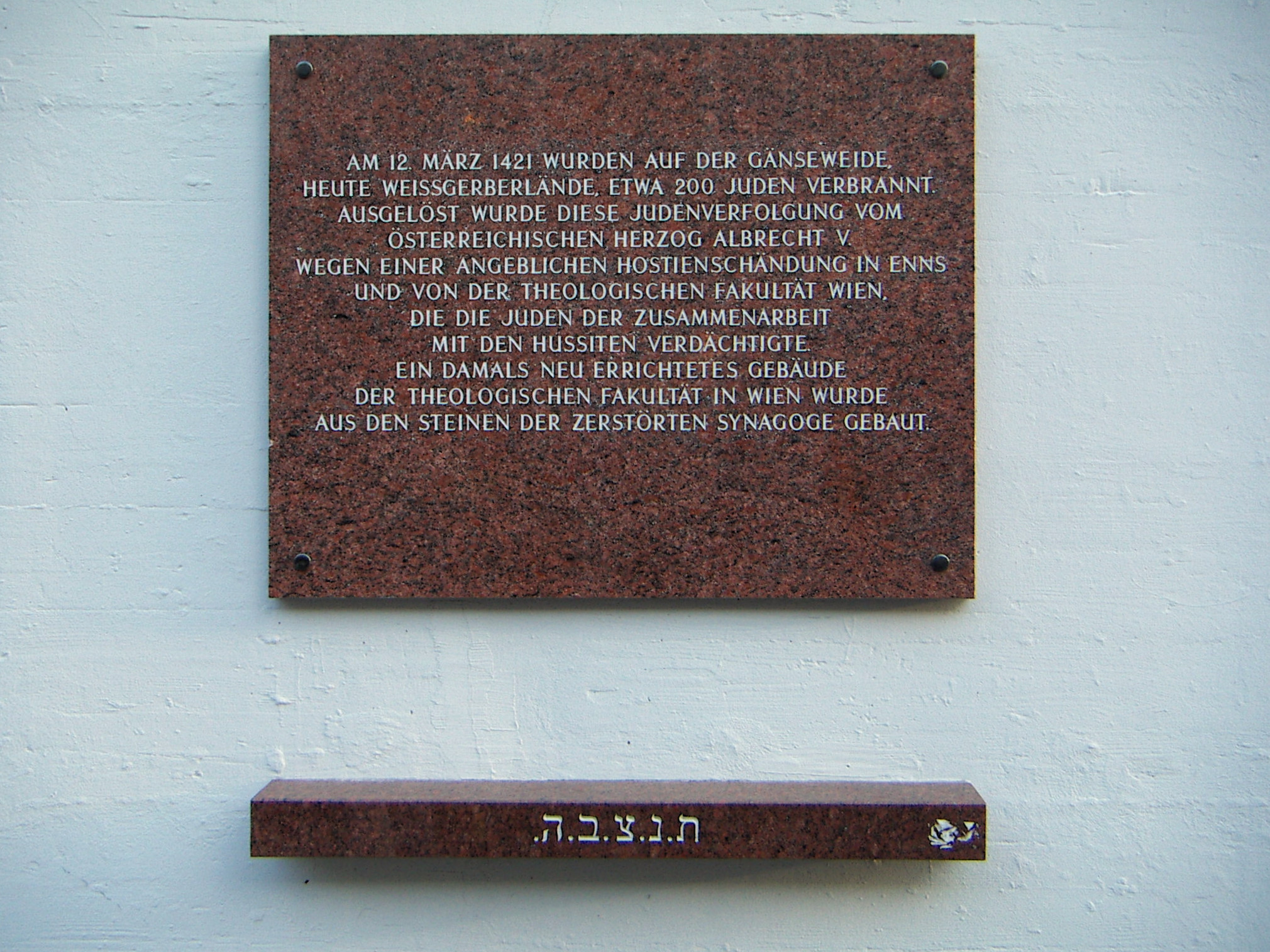 1030 Wien, Kegelgasse 40, Gedenktafel, Judenverfolgung im Jahre 1421 (Wiener Gesera)